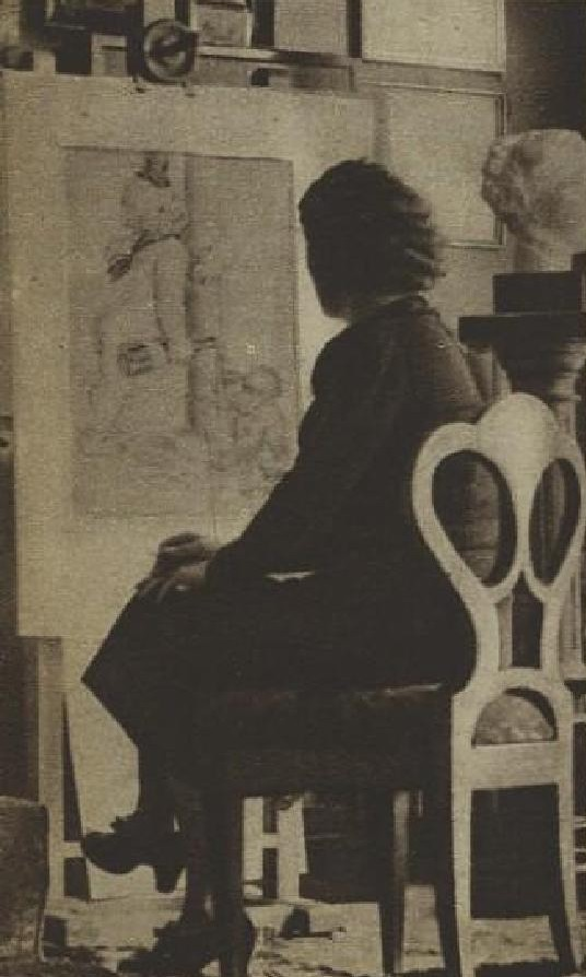 Marie Fischerová-Kvěchová (1892-1984), česká malířka a ilustrátorka